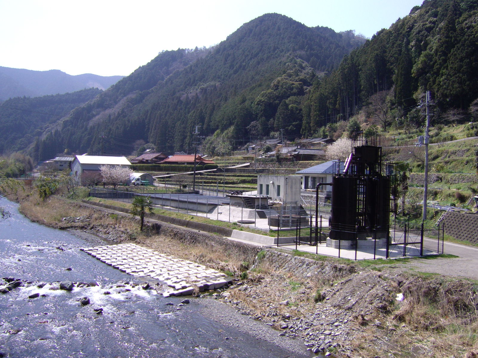 重要文化的景観「蘭島および三田・清水の農山村景観」－清水地区湯子川集落